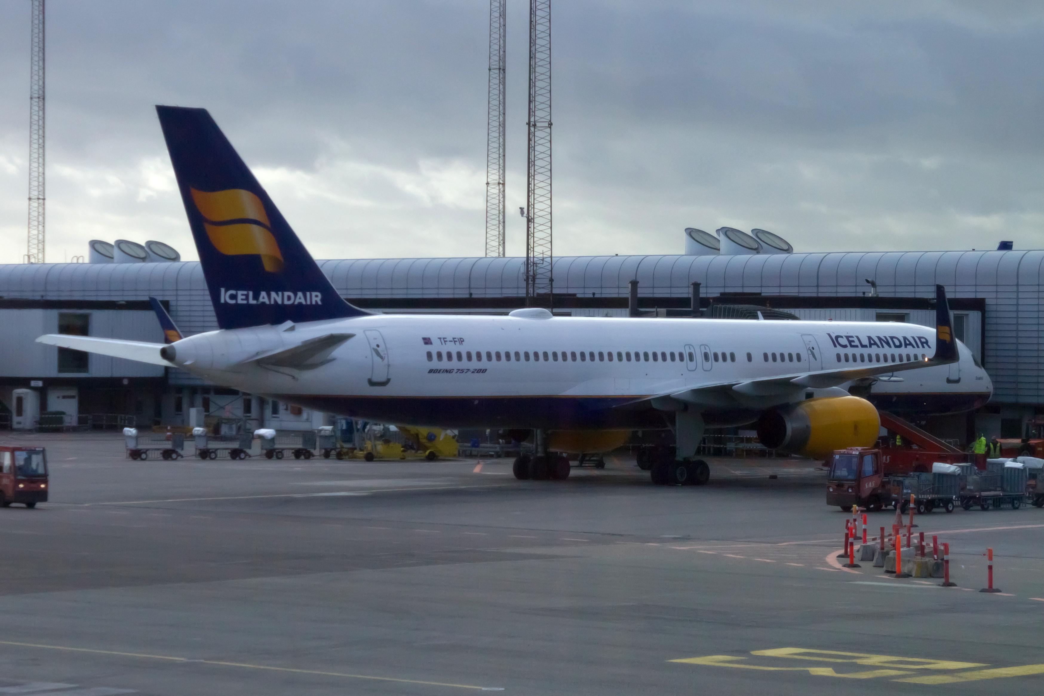 Boeing 757 de Icelandair no aeroporto de Copenhague.